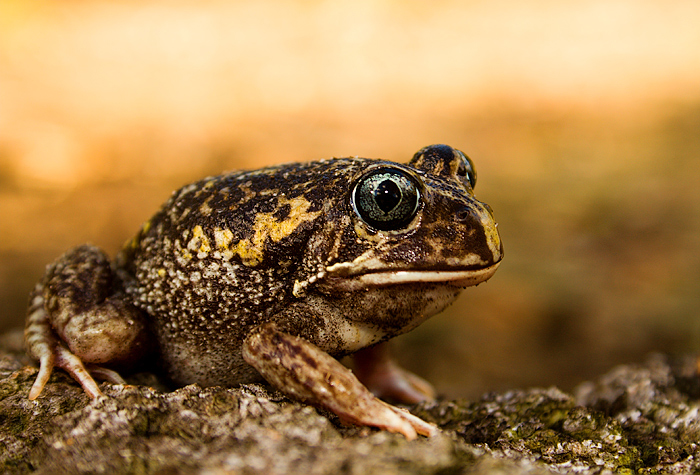 A Moaning Frog (Heleioporus eyrei)